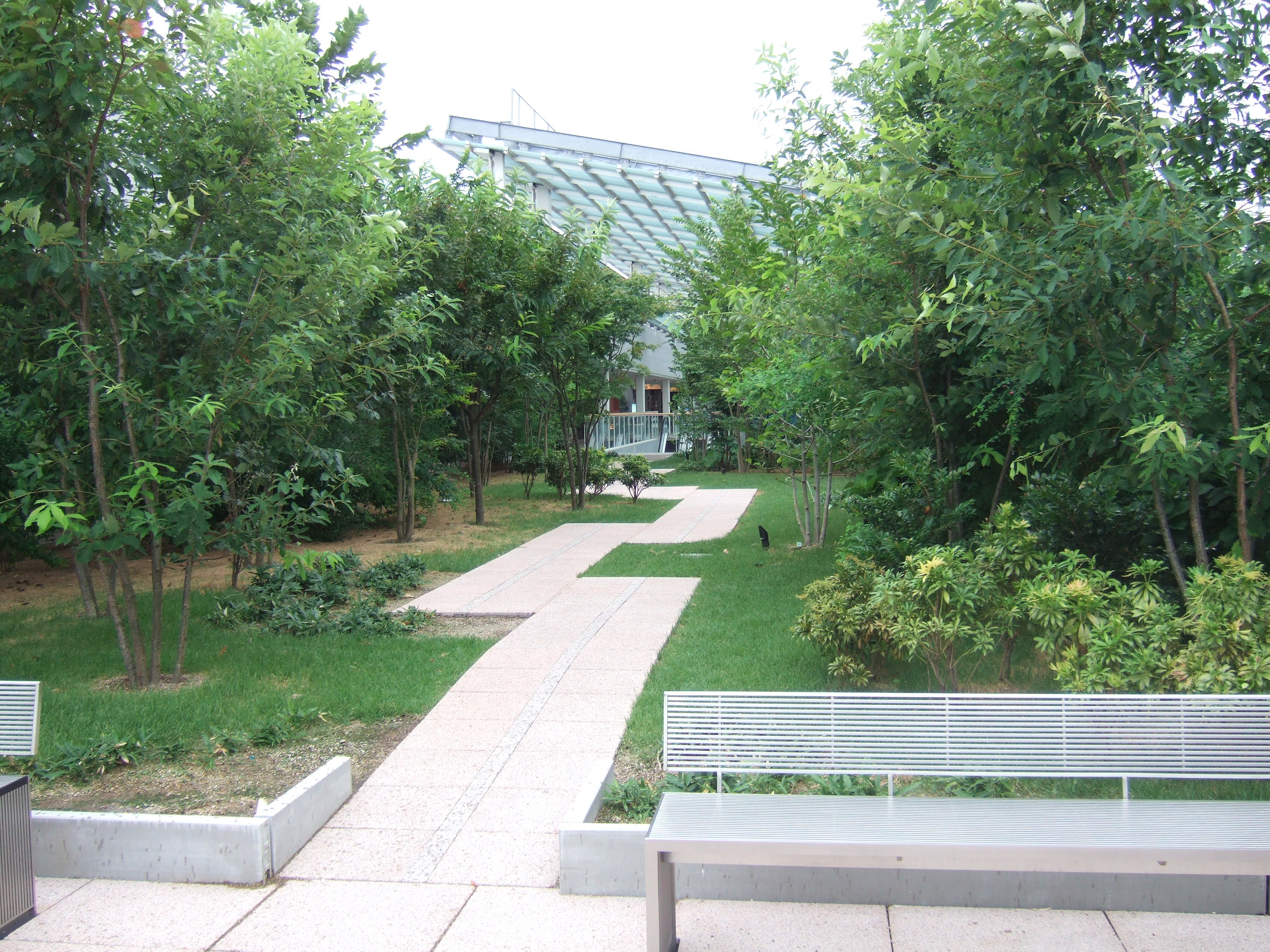 成城コルティ東側屋上庭園